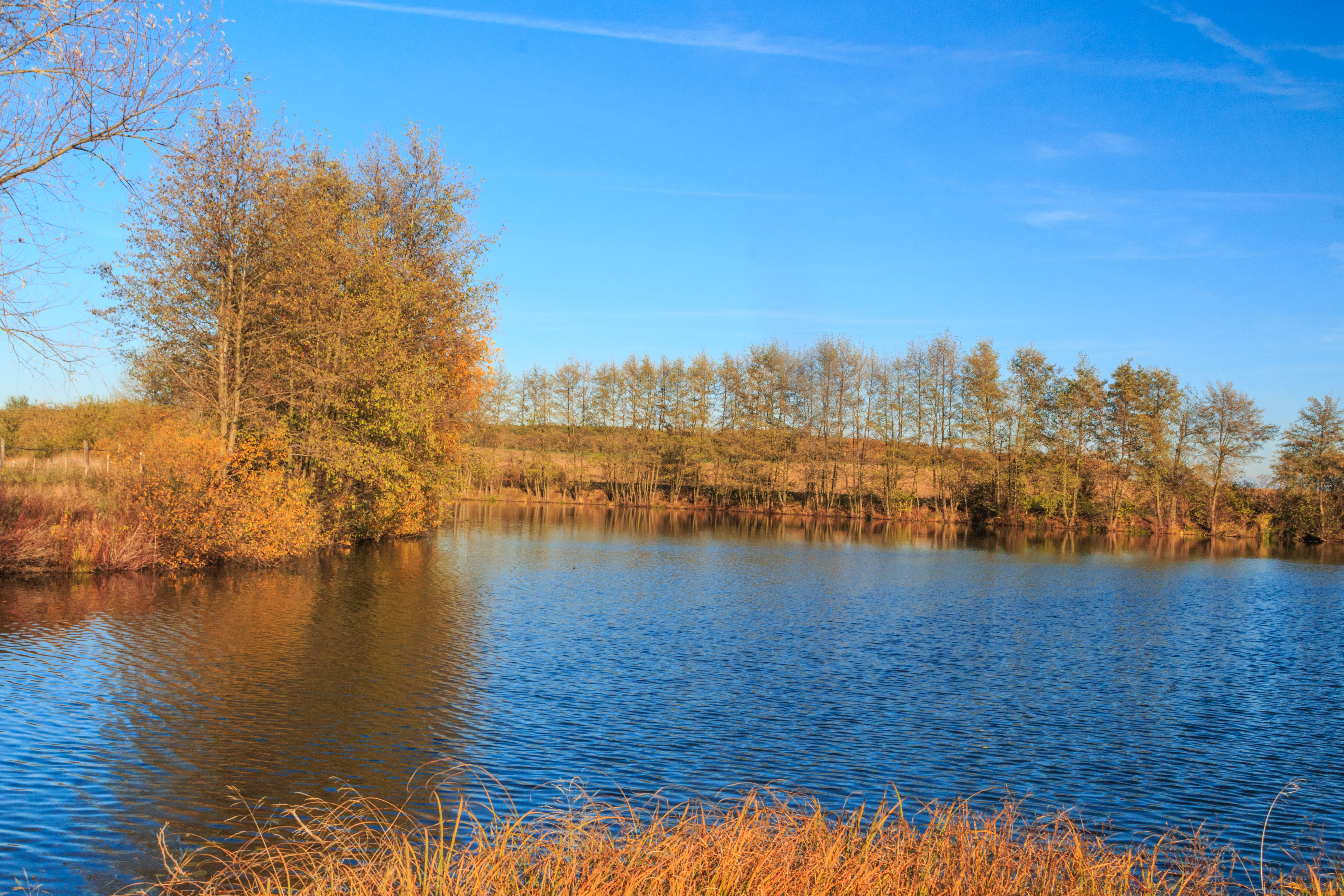 Rybník Konopáč u Kopidlna